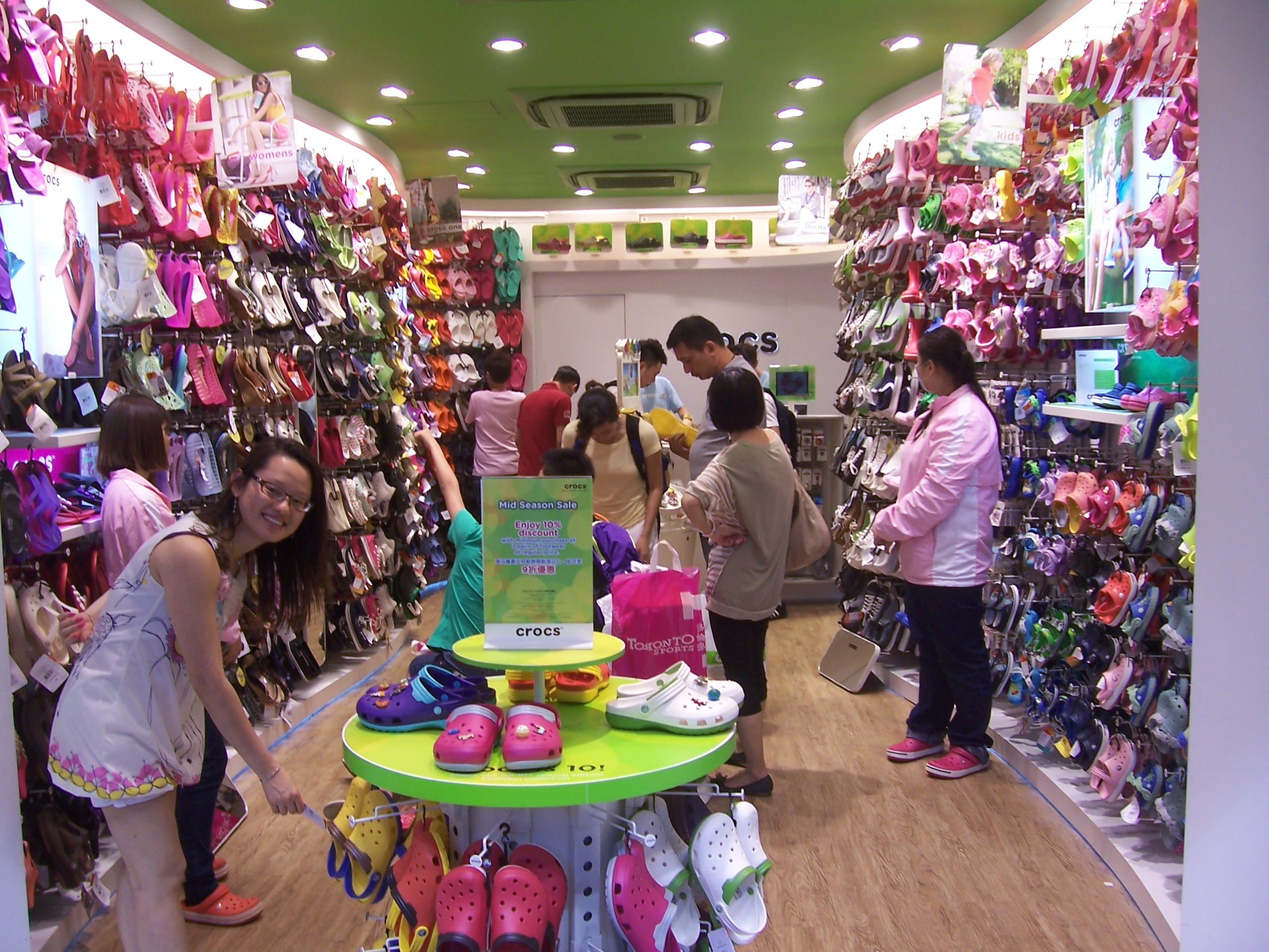 Magasin Crocs, Haiphong road, Hong-Kong